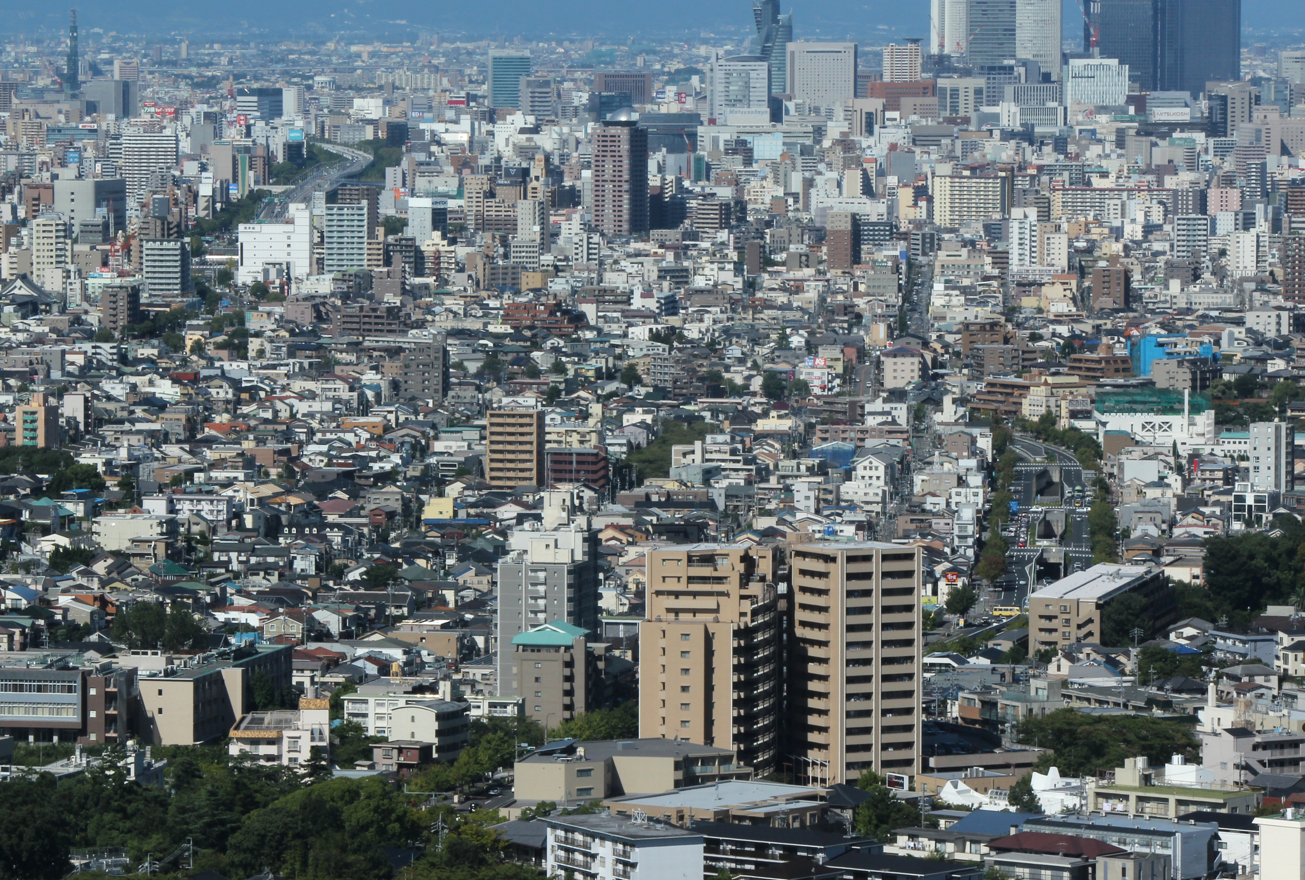 名古屋市道鏡ヶ池線を東山スカイタワーから望む